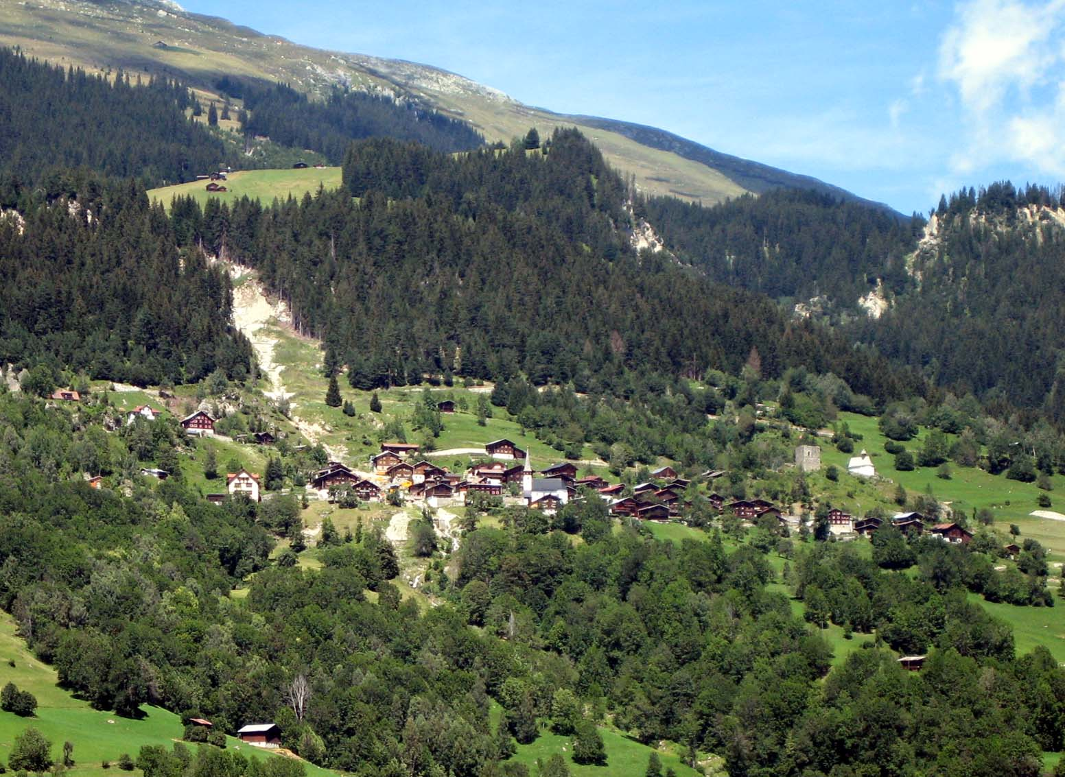 Schlans